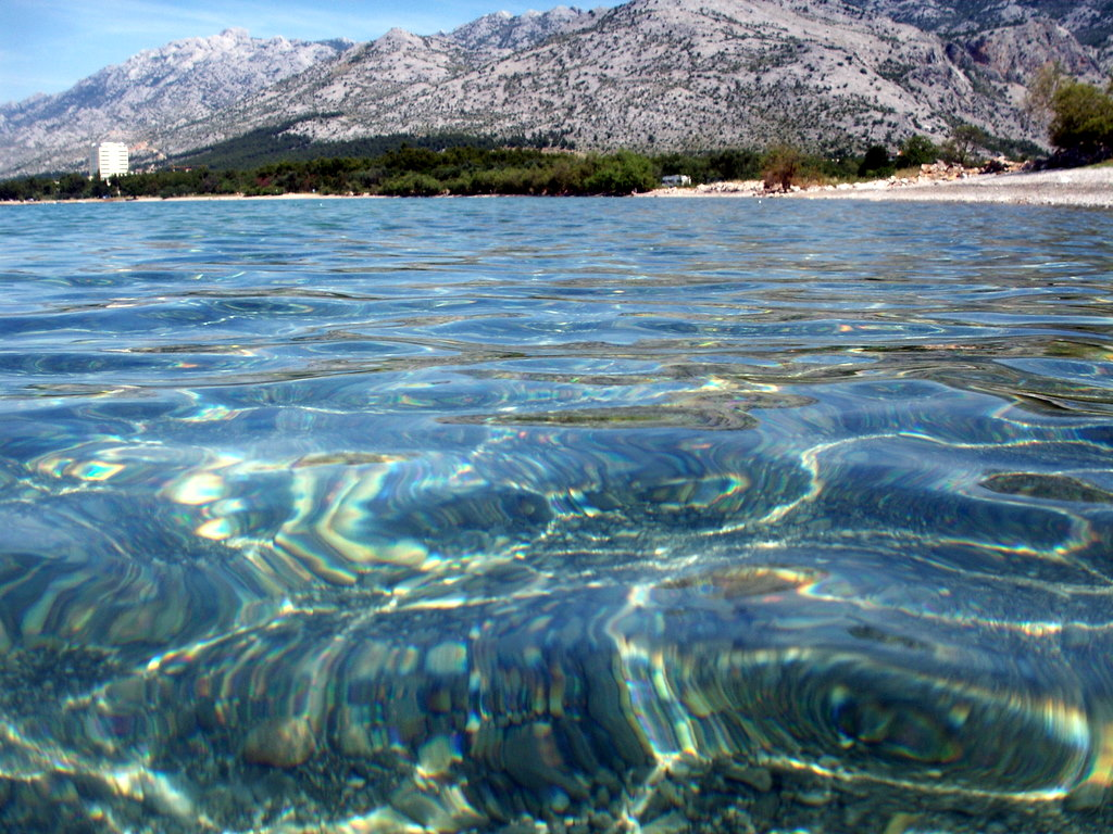 Dalmatinische Küste bei der osmanischen Burgruine Večka kula bei Starigrad-Paklenica in Kroatien/Europa. Ansicht Richtung Nord-Westen. Im Hintergrund das Hotel Alan und das Velebit-Gebirge in dem der Nationalpark Paklenica.